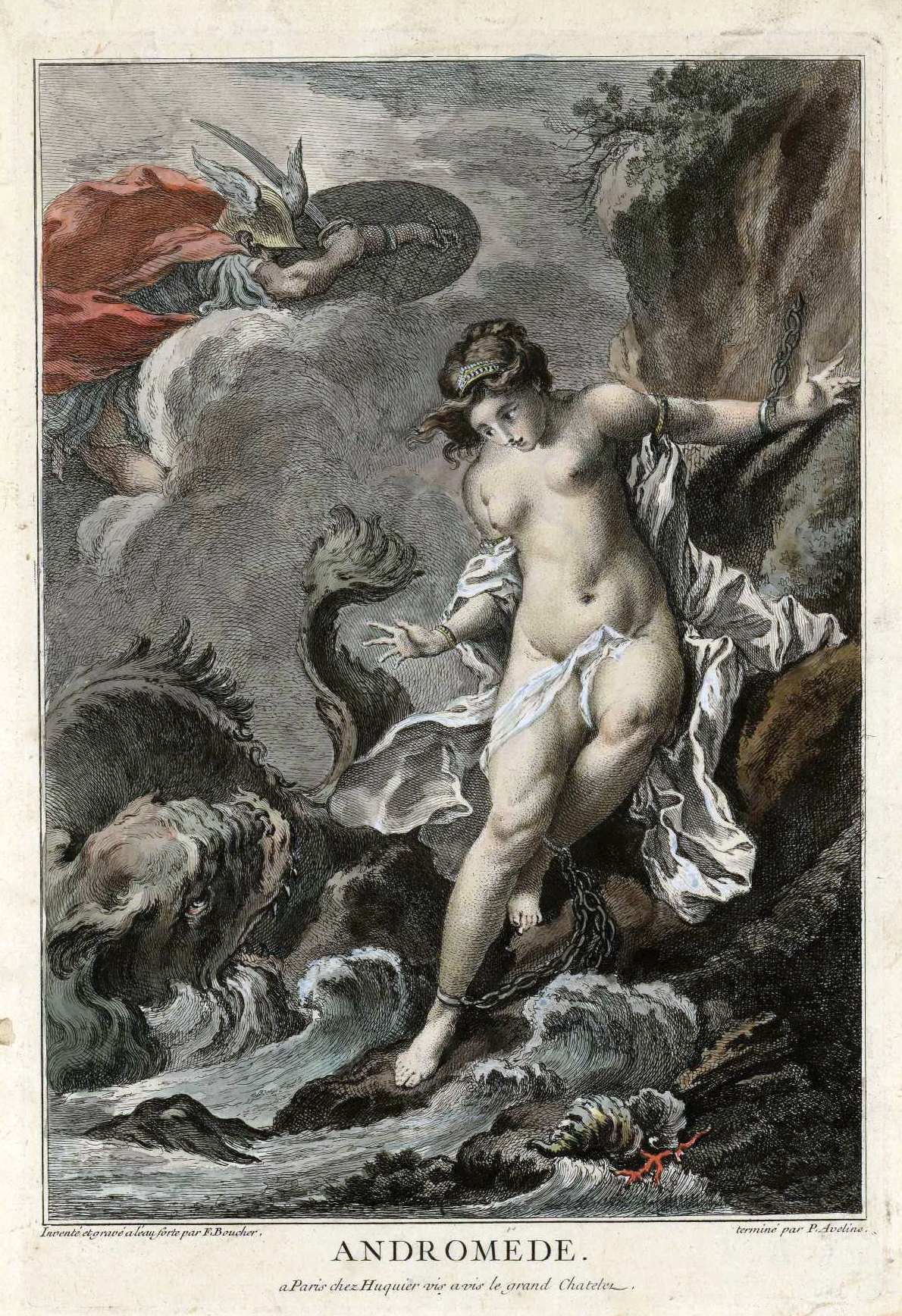 Pierre-Alexandre Aveline según François Boucher, Andrómeda. Aguafuerte y buril coloreado a mano. Firmado: Inventé et gravé a l'eau forte par F. Boucher ; terminé par P. Aveline